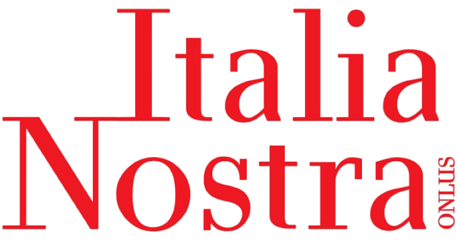 Logo dell'associazione di promozione sociale Italia Nostra